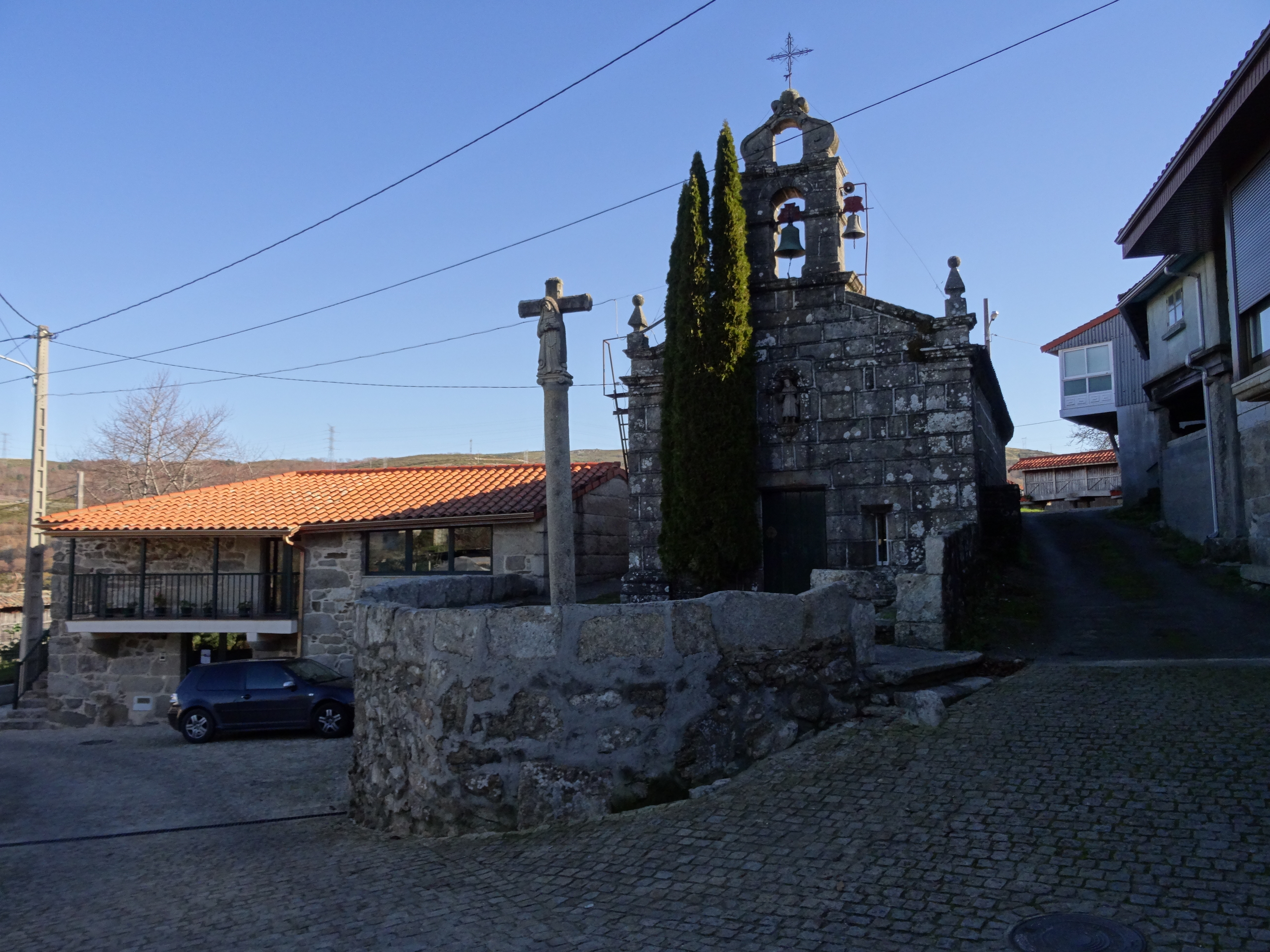 Ver título.